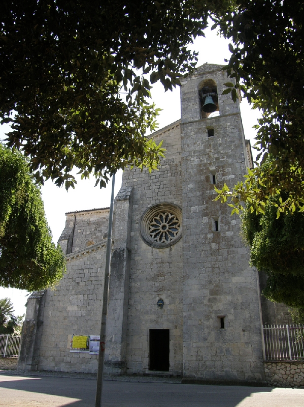 Santa Maria Arabona (Manoppello)